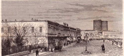 Баку. Набережная Александра II